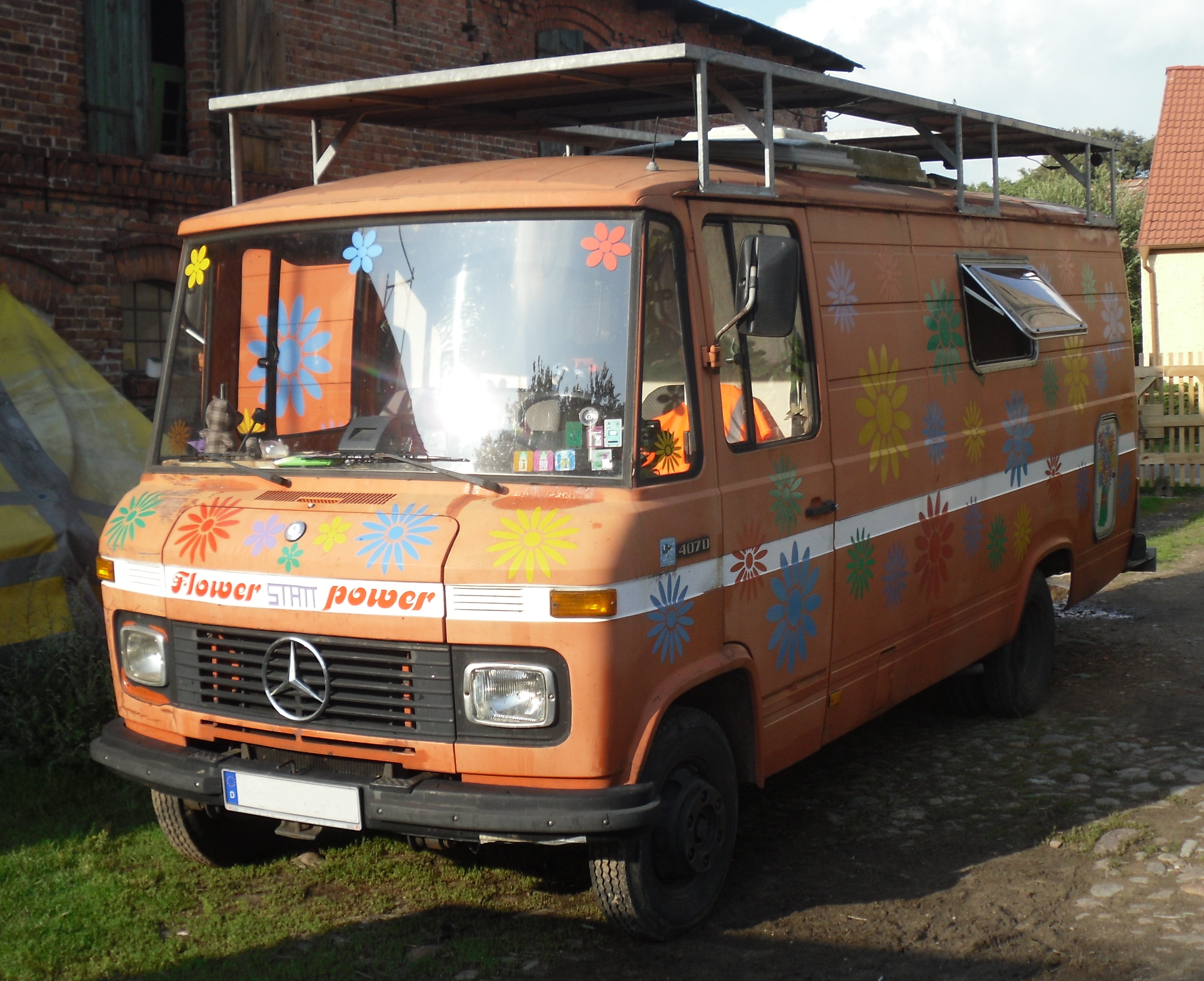 Mercedes-Benz T 2, 407 D (OM 616) als Wohnmobil